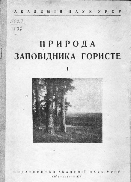 Палітурка видання "Природа заповідника Гористе" 1941: скан обкладинки